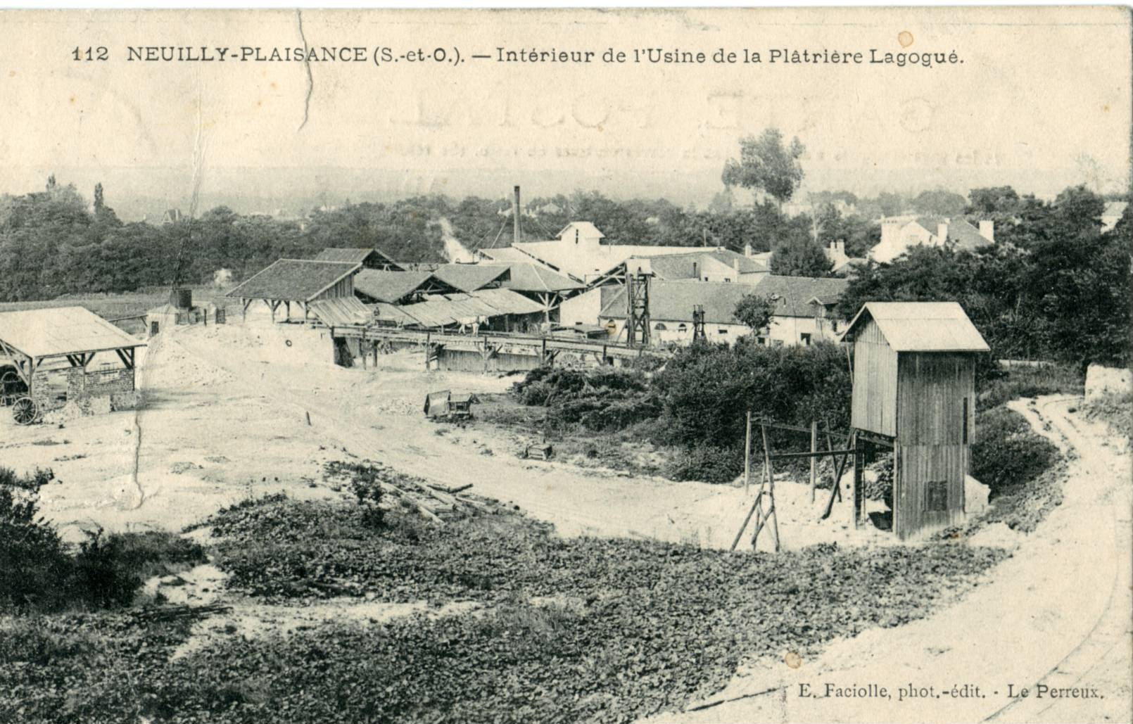 Carte postale ancienne éditée par FACIOLLE N°112 NEUILLY-PLAISANCE - Intérieur de l'Usine de la Plâtrière Lagogué (au Plateau d'Avron)